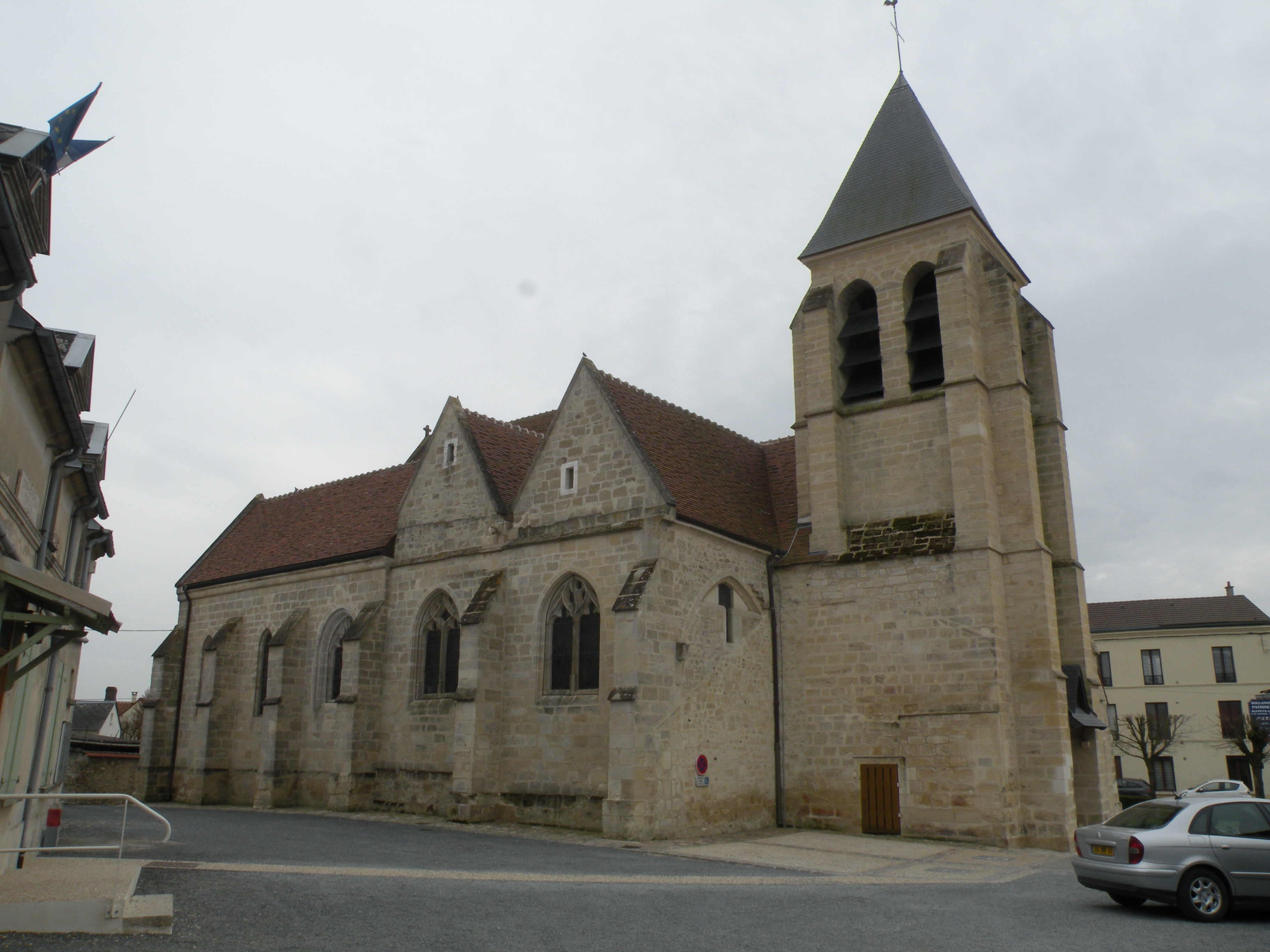 église Saint-Jean-Baptiste de Crouy-en-Thelle